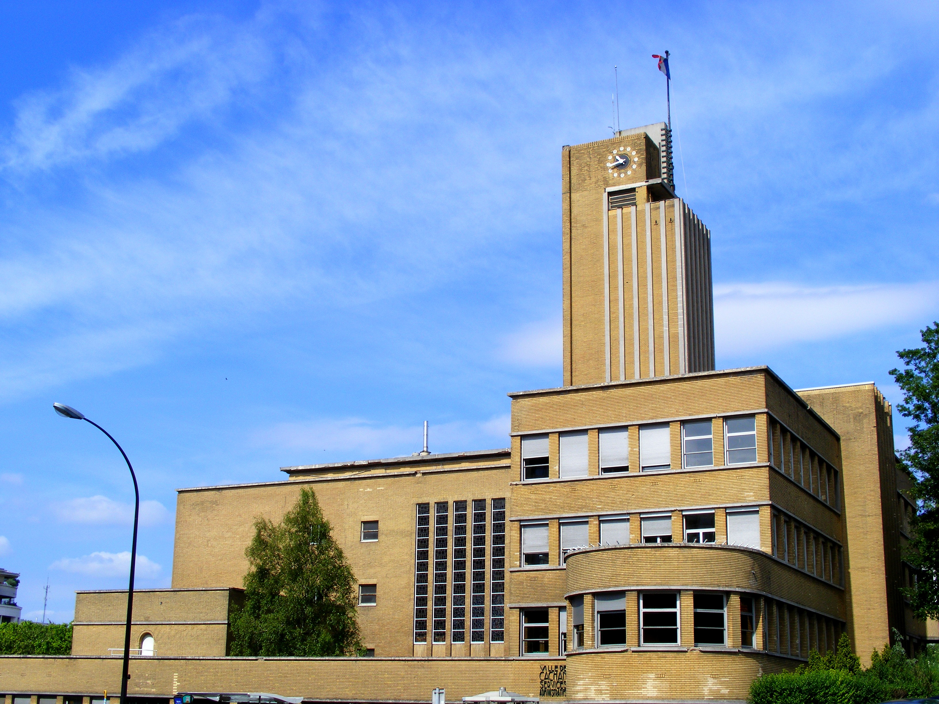 Mairie de Cachan